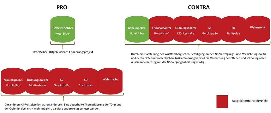 Ortsgebundenes Erinnerungsprojekt Hotel Silber PRO und CONTRA